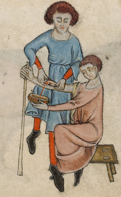 Aderlassscene